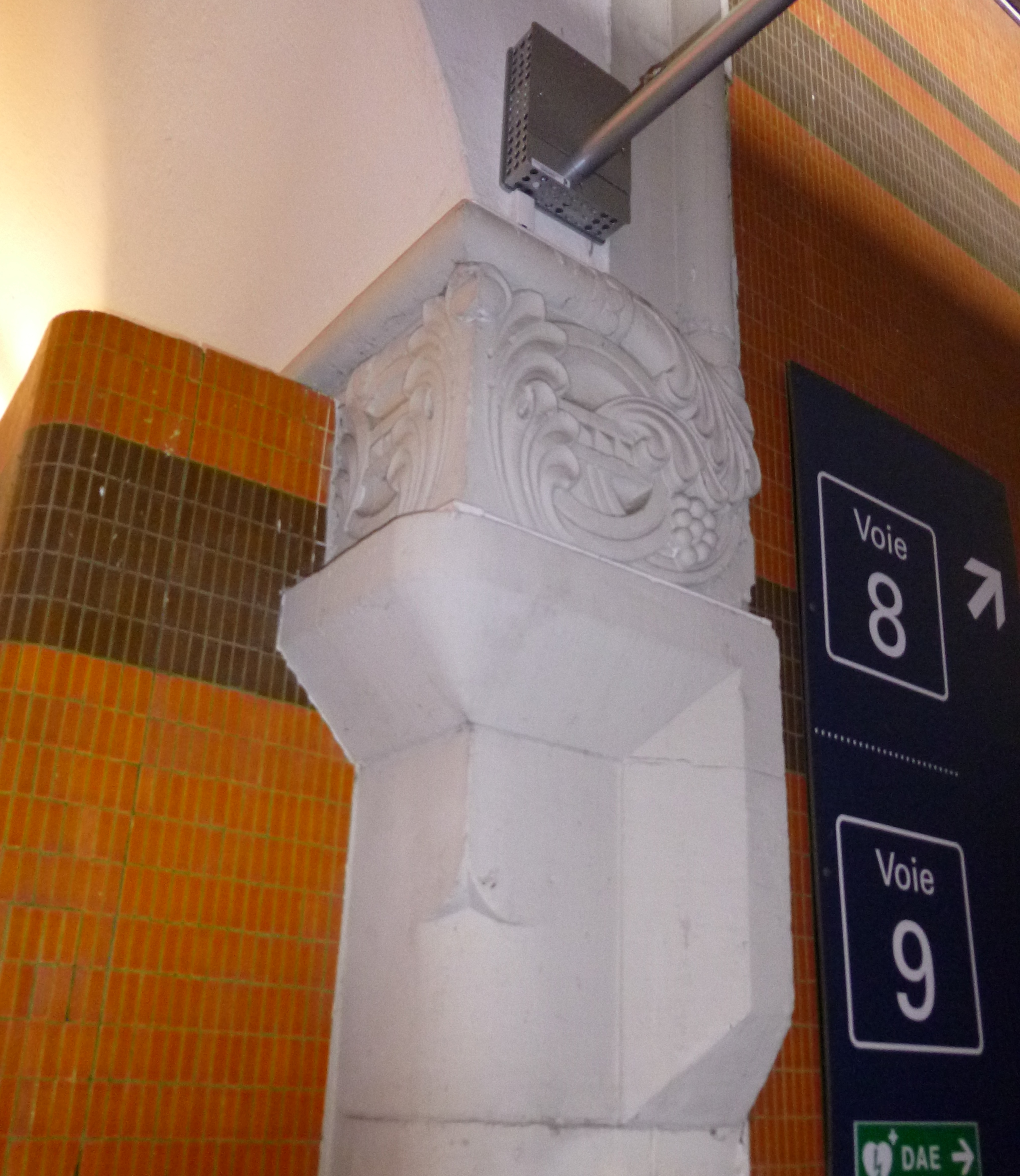 Détail de la frise d'un passage de la gare de Metz (zone d’accès aux quais) recouverts par un pan de mur ajouté après les années 50.